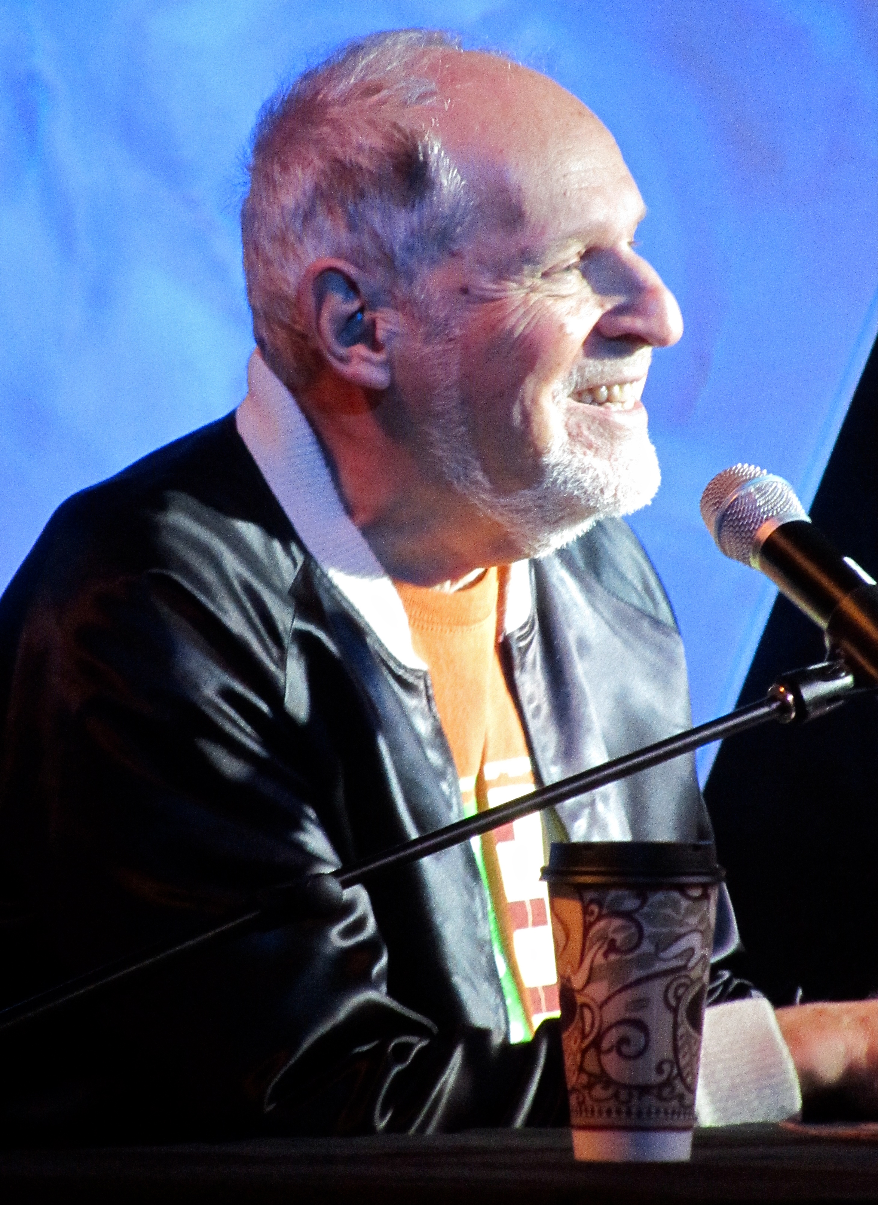 Herb Deutsch speaks on a panel at MoogFest 2011.